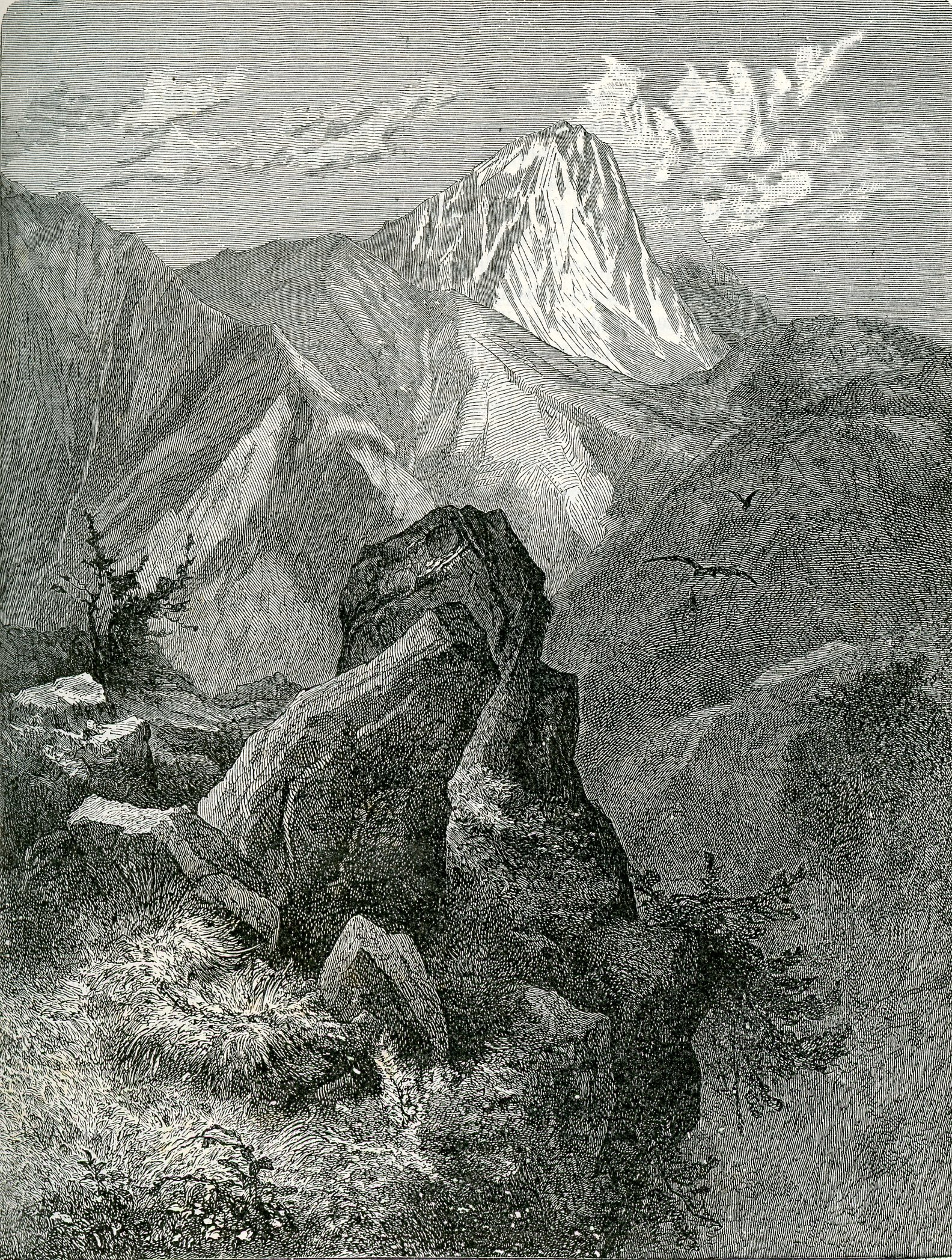 Il Gran Sasso d’Italia (incisore anonimo 1899).